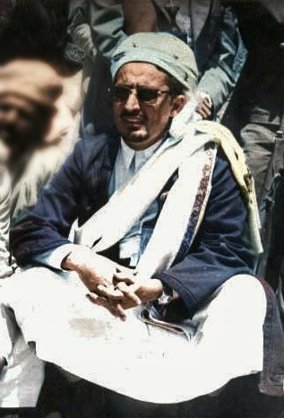 Personnage extrait d'une photo d'ensemble